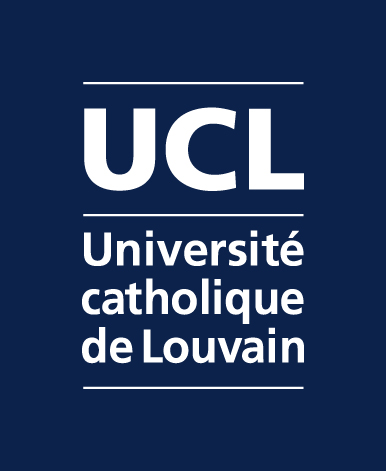 Ancien logo de l'Université catholique de Louvain (2015-2018)